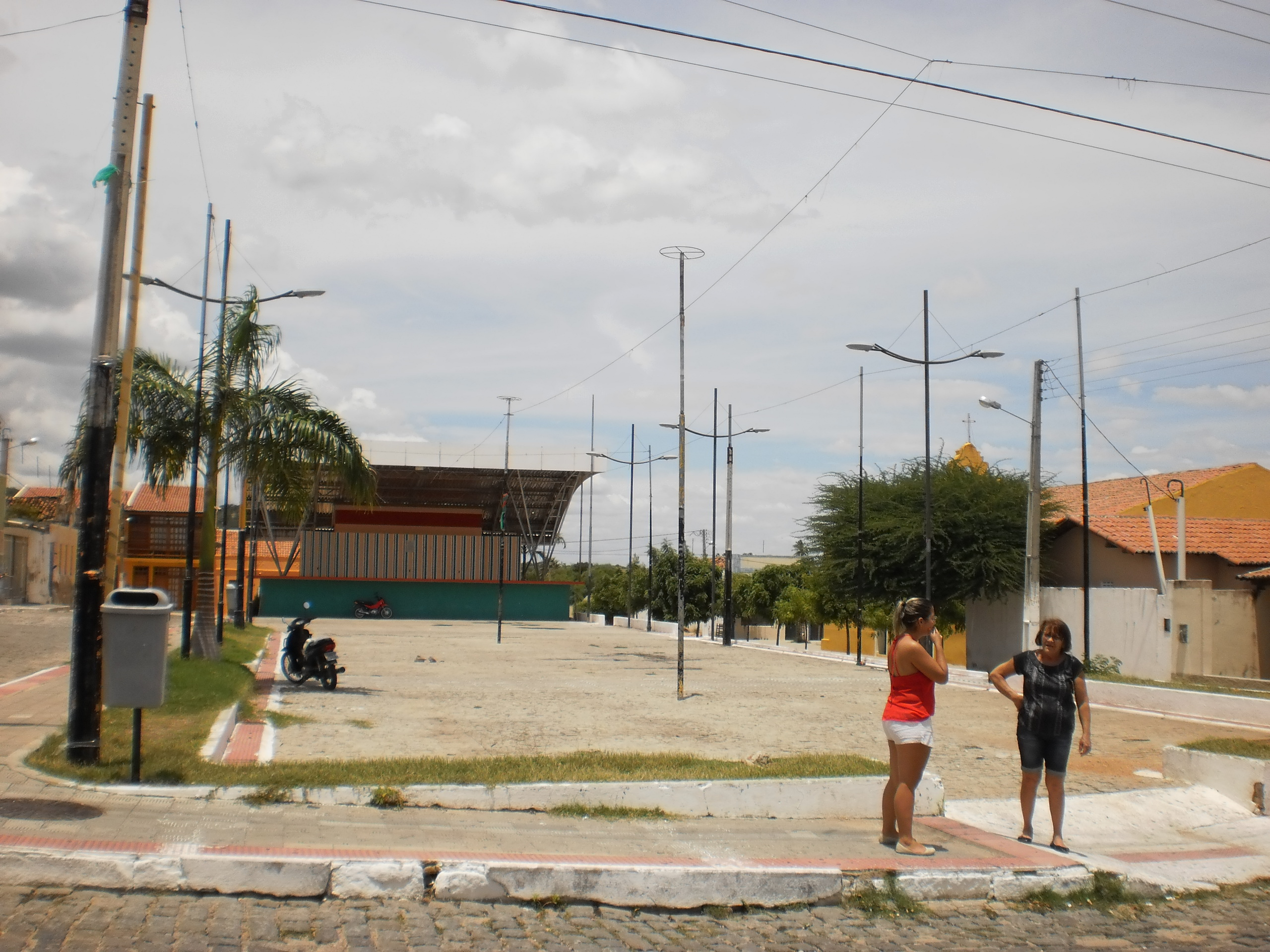 Praça de eventos de Alexandria - Rio Grande do Norte, Brasil.